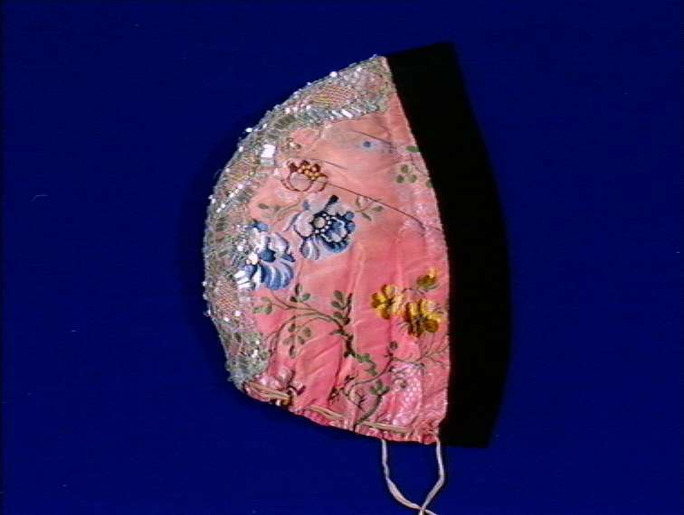 Tobladlue fra Røros